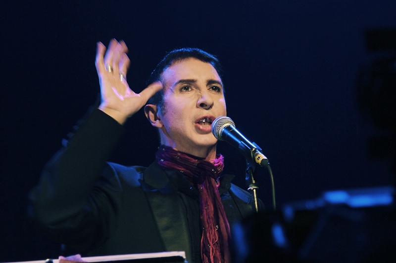 Marc Almond @ Manezh Kadetskogo Korpusa